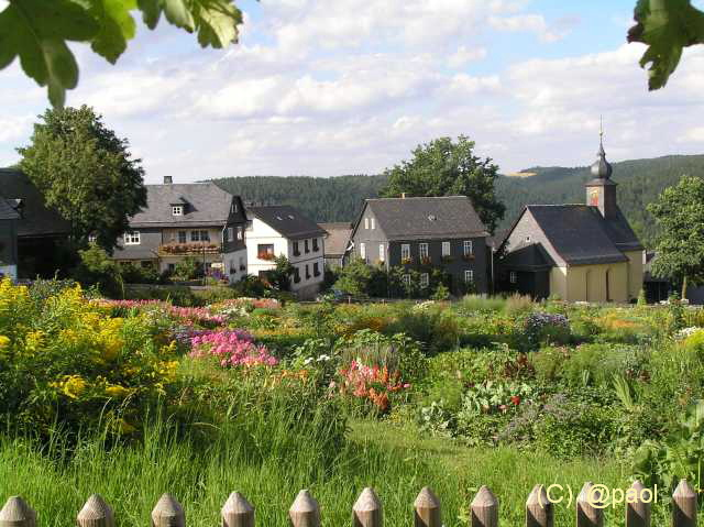 Blick über das Pflanzbeet auf die Kirche